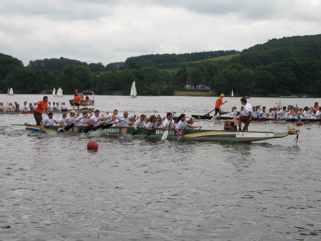 Drachenbootrennen auf dem Bochumer Kemnadersee